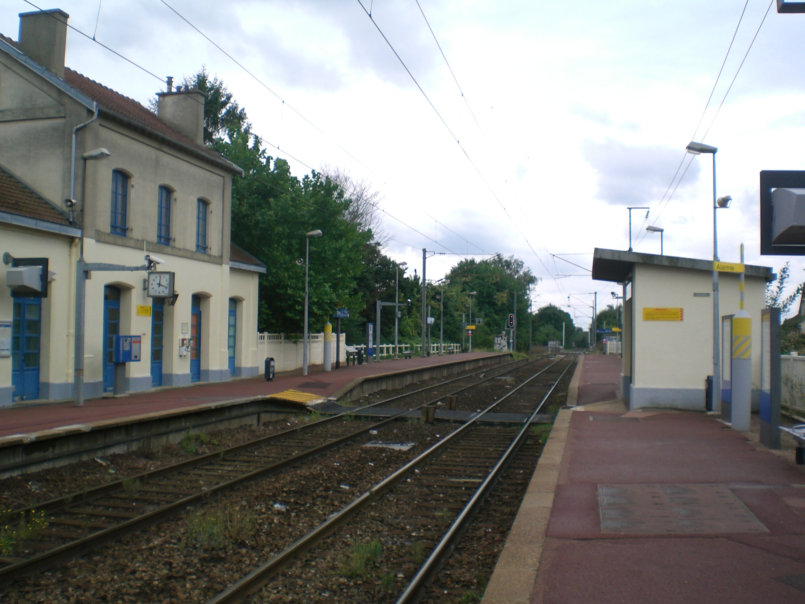 quai de la Gare de Belloy - Saint-Martin